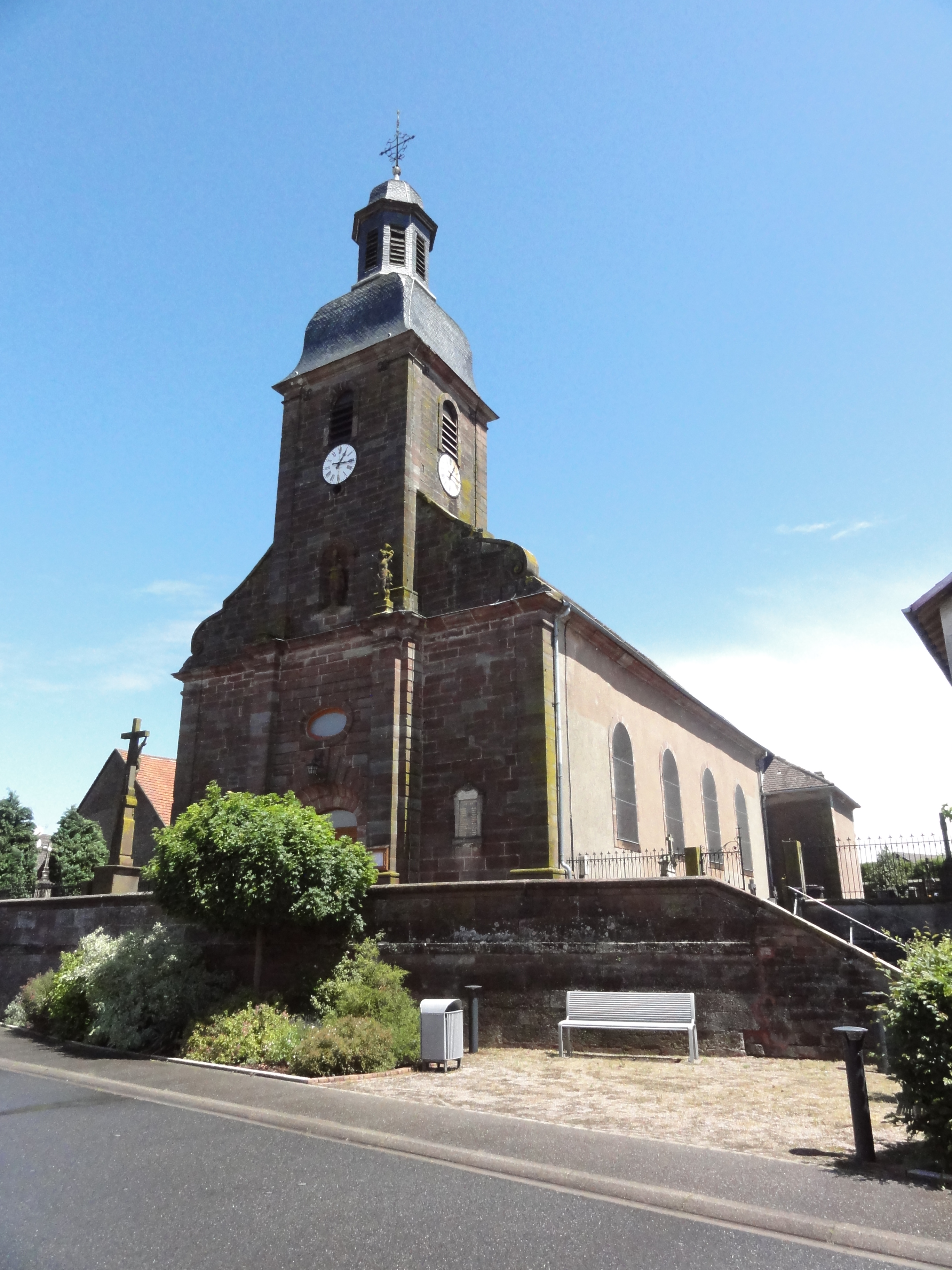 Mittelbronn (Moselle) église